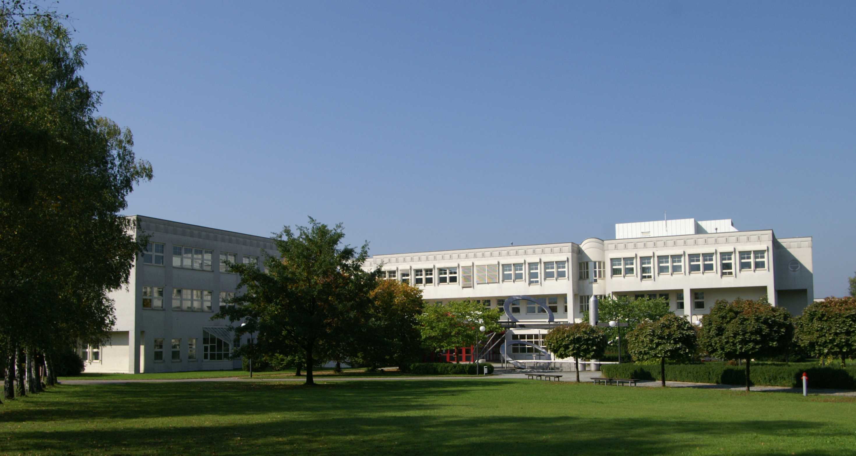 HTL Dornbirn und Universitätsinstitut für Textilchemie und Textilphysik im Stadtteil Schoren